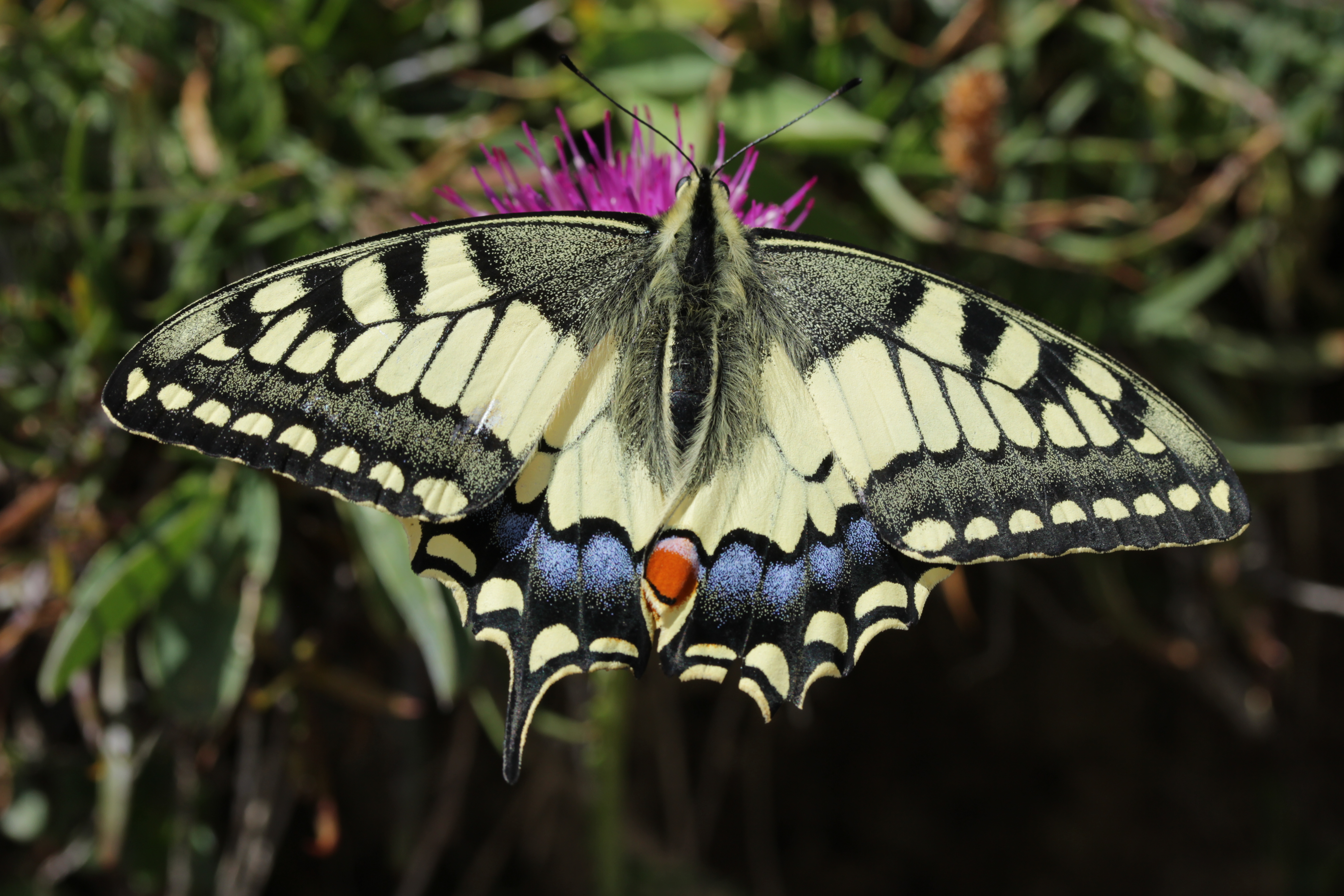 Swallowtail - Papilio machaon